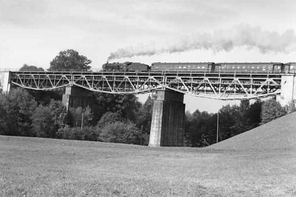 Haemmerlebruecke.